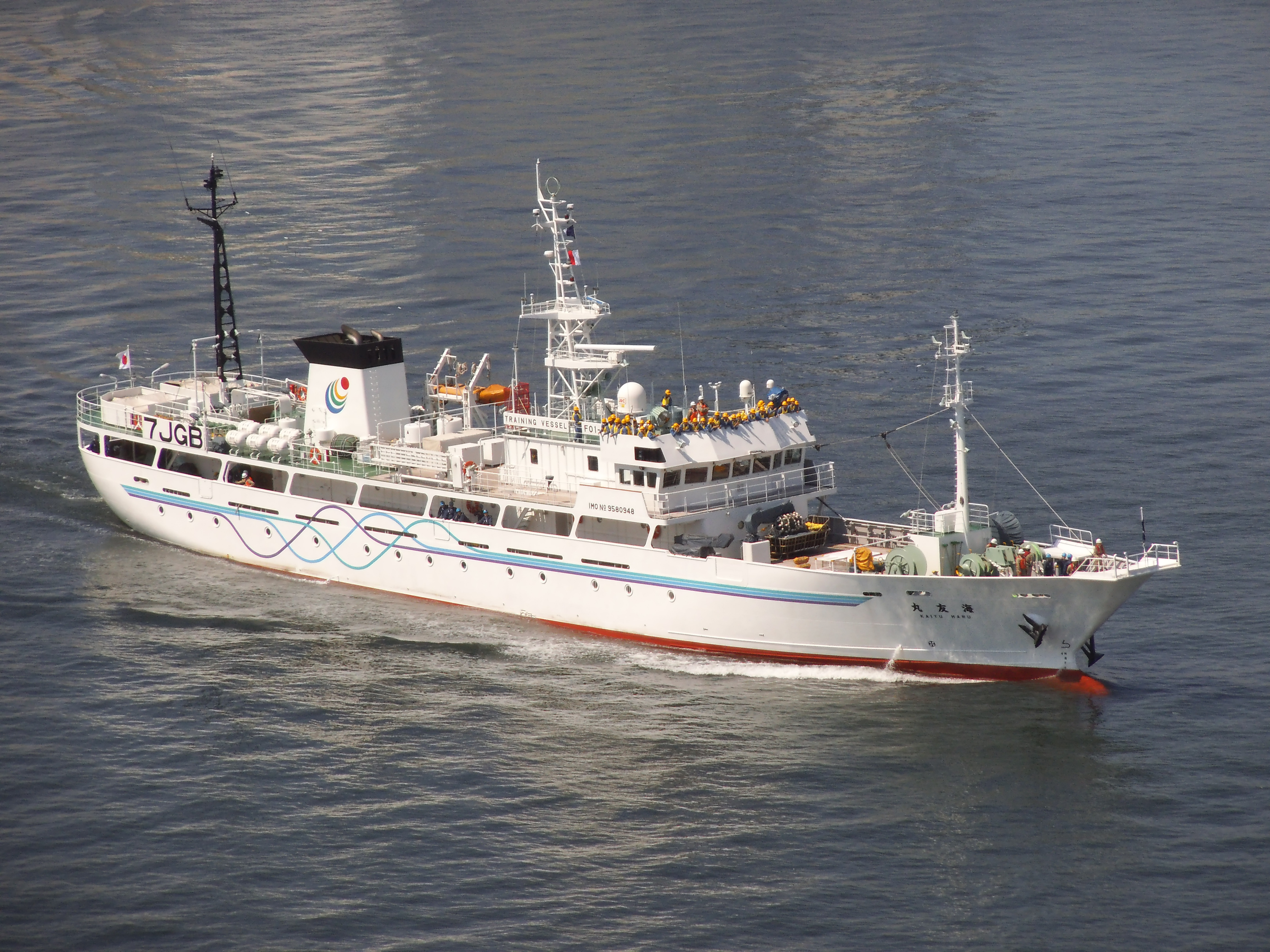 福岡県と山口県と長崎県が共同運航する練習船海友丸（かいゆうまる）、レインボーブリッジで撮影